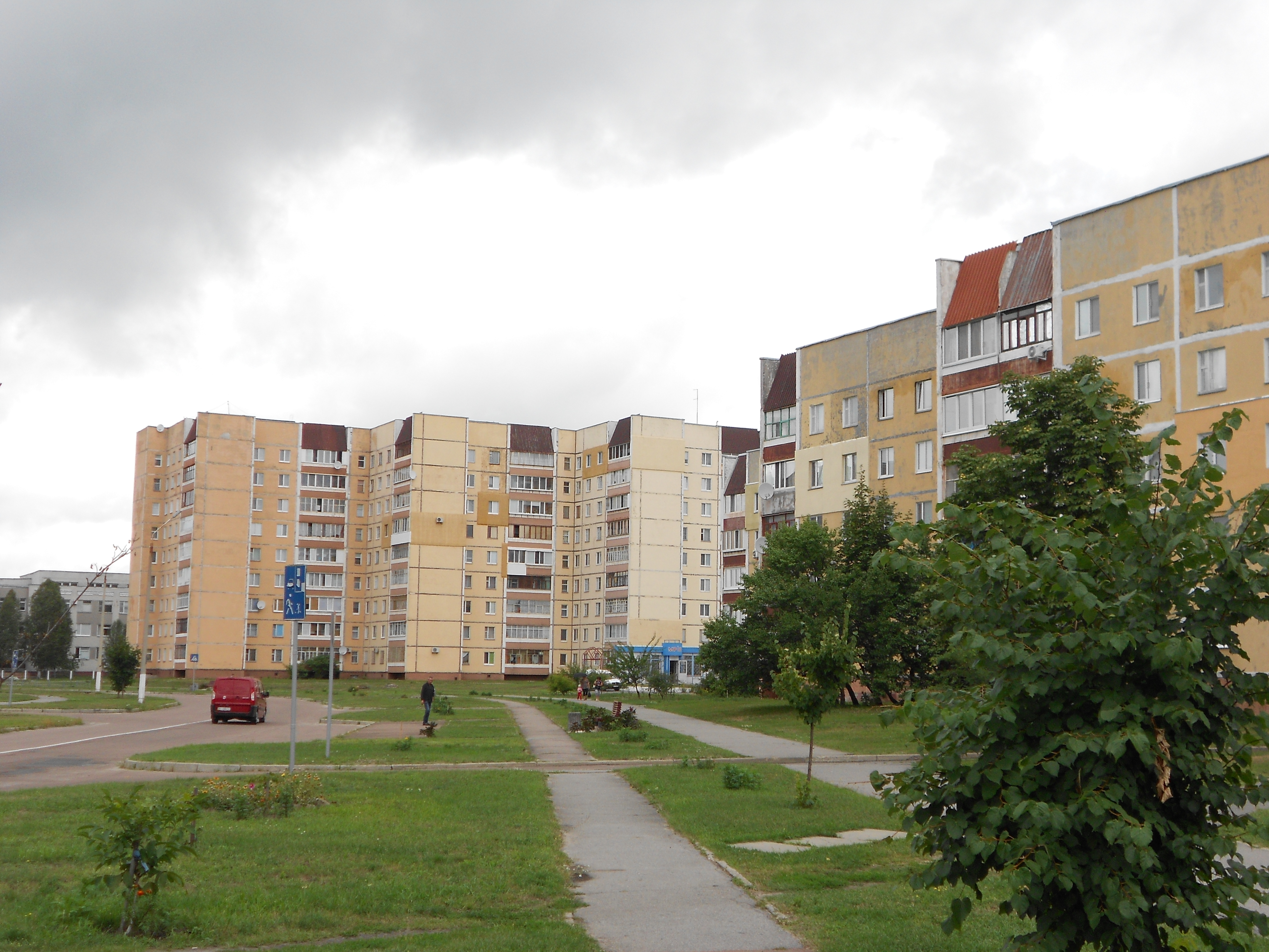 Вікіекспедиція до м. Славутича 2013 рік